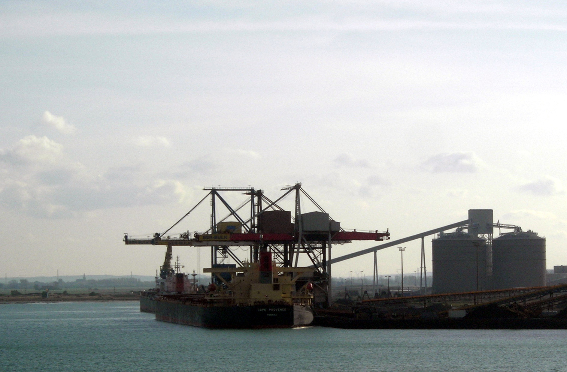 Cape Provence, un vraquier, à quai à Dunkerque IMO Number: 9300570 MMSI Number: 371162000 Callsign: 3EBL9 Length: 289 m Beam: 45 m